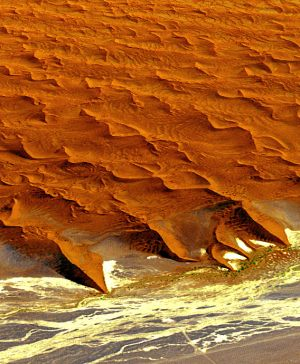 Satellitenbild der Sanddünen im Namib-Naukluft-Nationalpark.